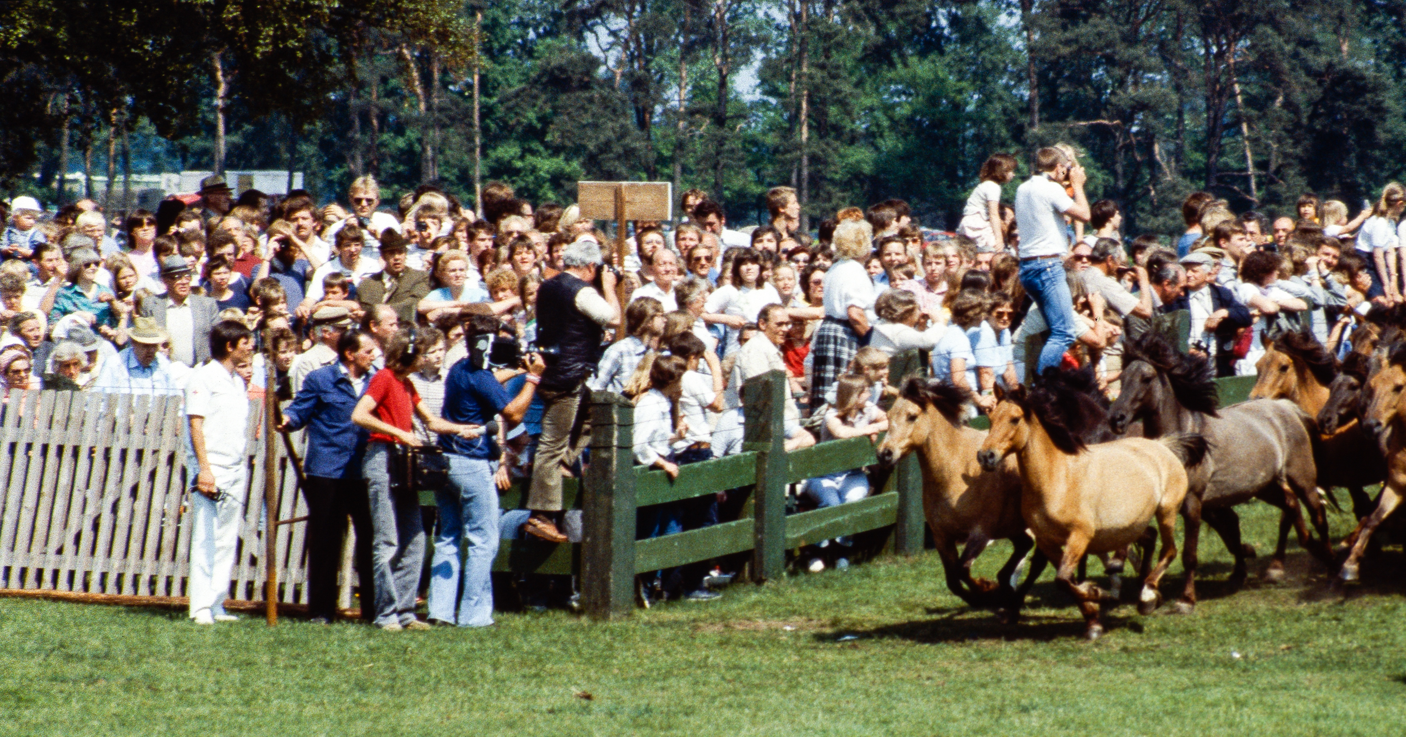 Wildpferde-Fang 1982 in Dülmen, Nordrhein-Westfalen, Deutschland